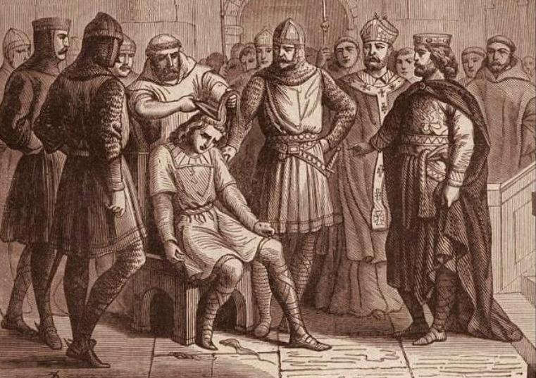 Source initiale inconnue, certainement gravure du XIXe siècle, donc dans le domaine public, cependant s'il existe un droit, alors prière de nous en informer nous enlèverions immédiatement le document de l'encyclopédie Wikipedia libre et gratuite